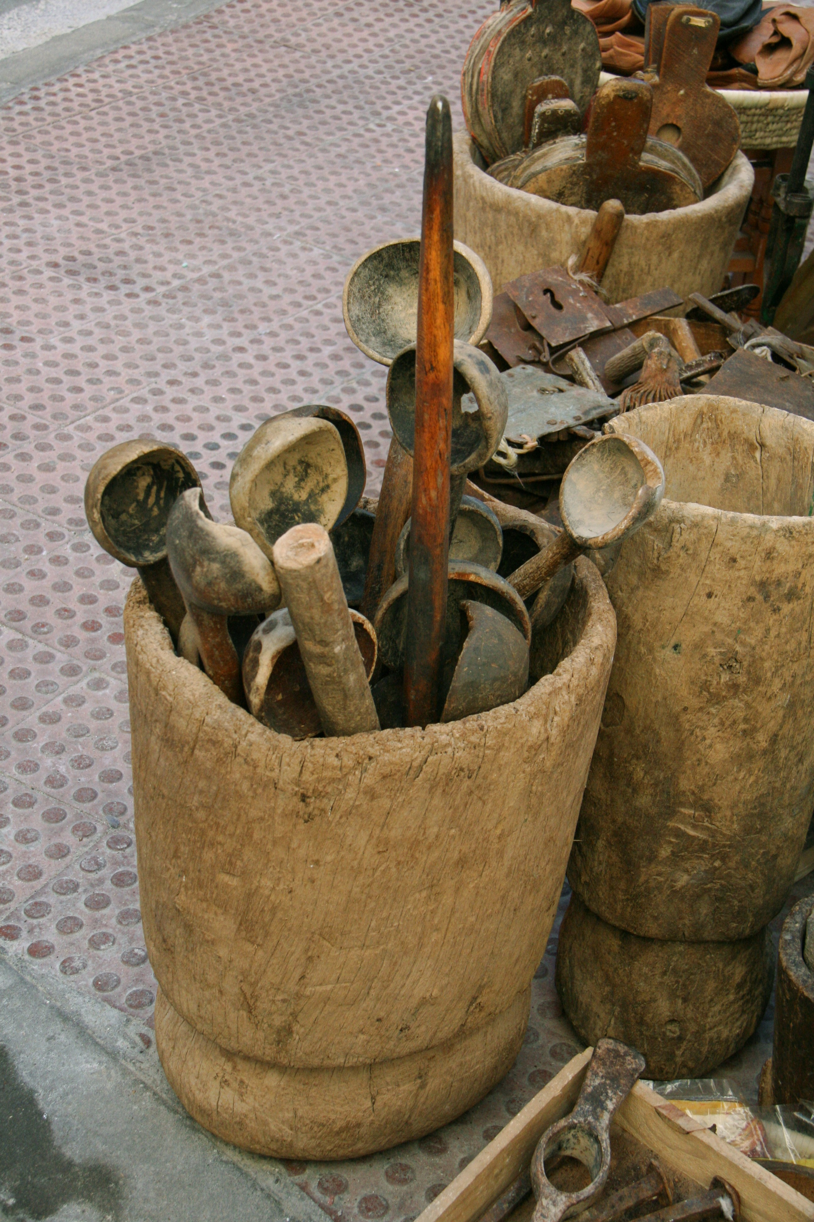 Cucharas de madera